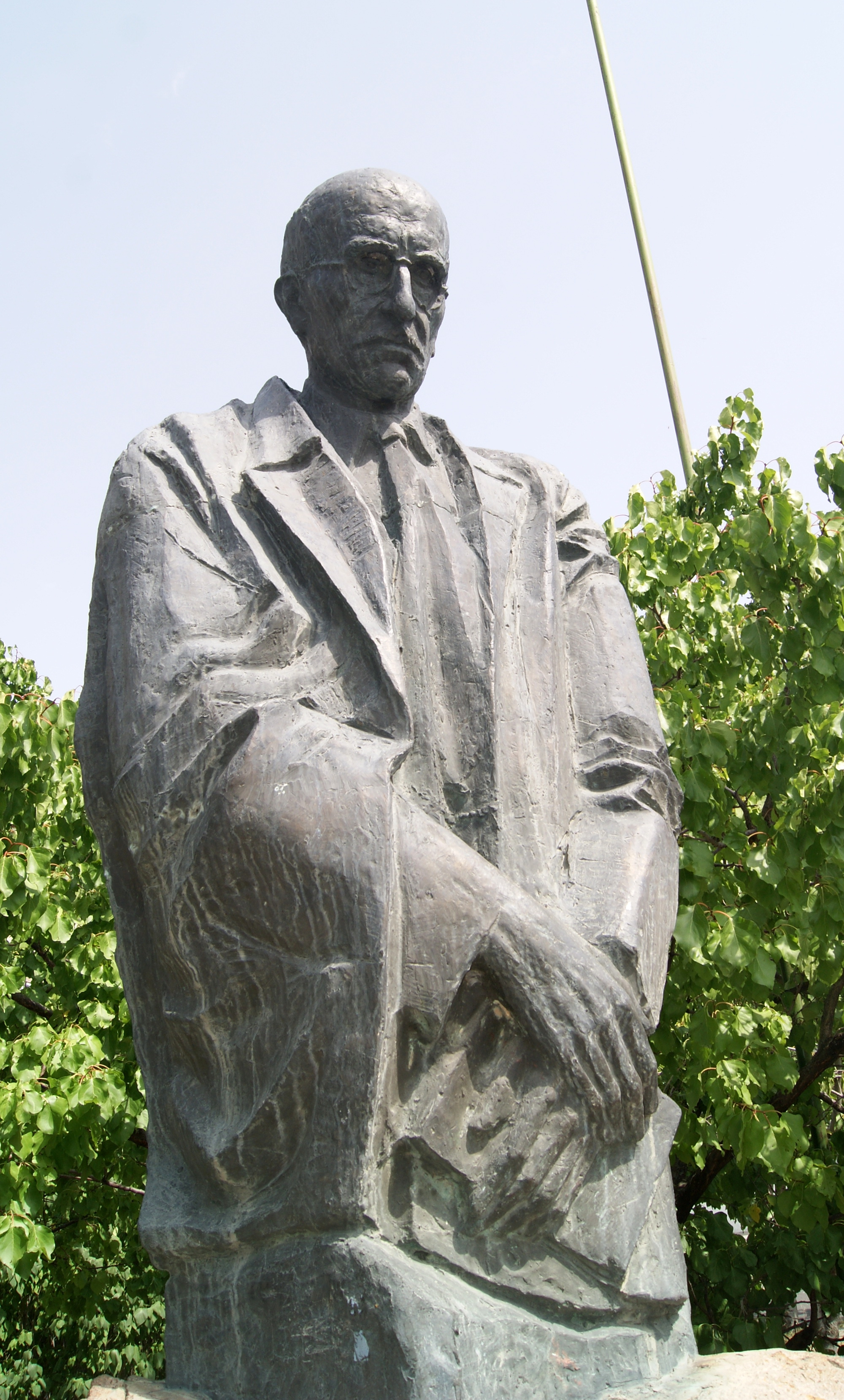 Վահան Թեքեյանի հուշարձանը Կարբիի համանուն դպրոցի առջև 58/20